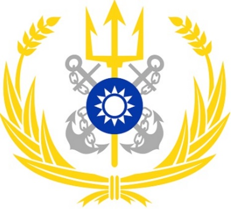 海軍艦隊指揮部部徽